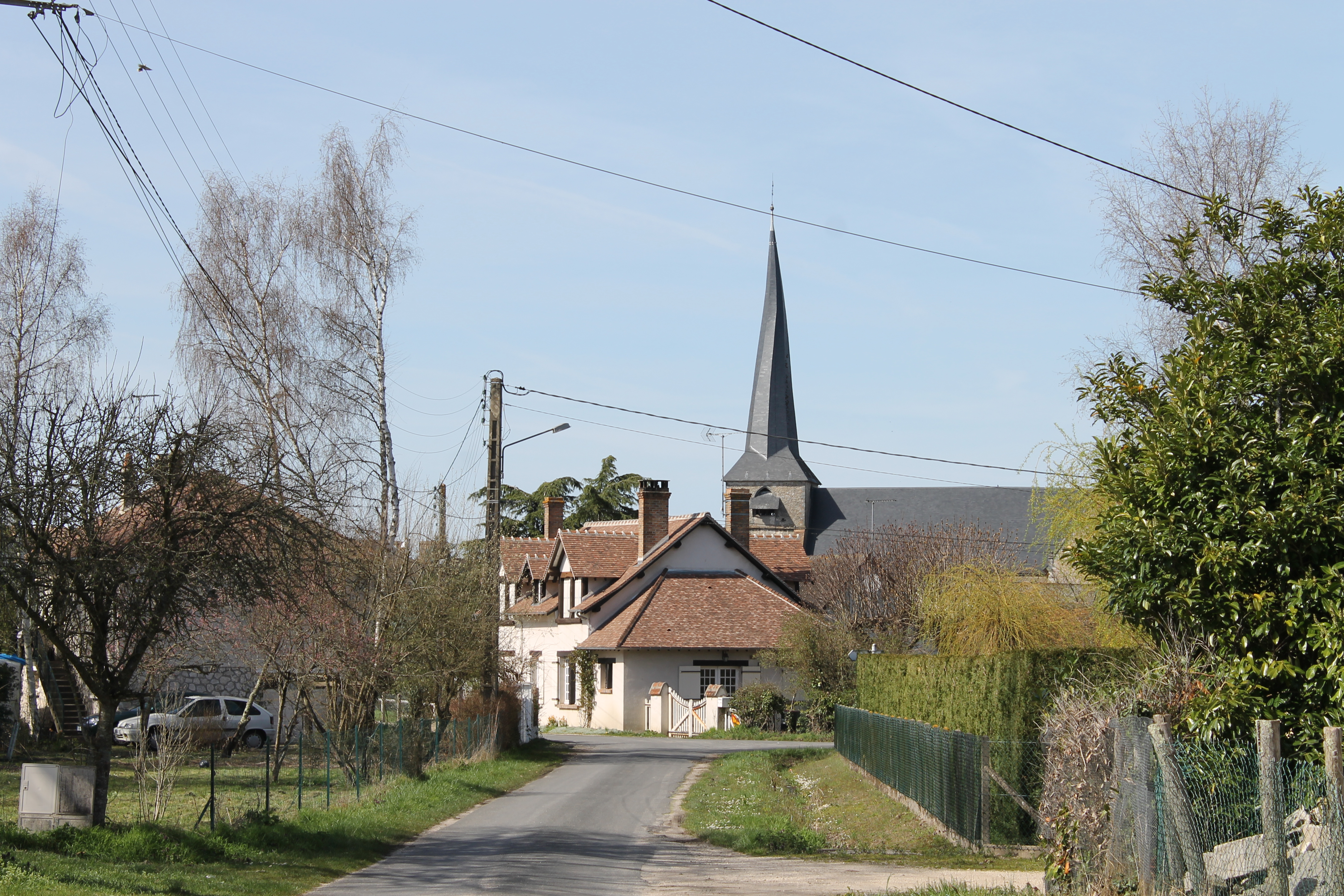 Église Saint Viâtre de Saint-Viâtre.